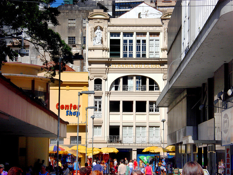 Fachada traseira da Livraria do Globo, Porto Alegre, Brasil.